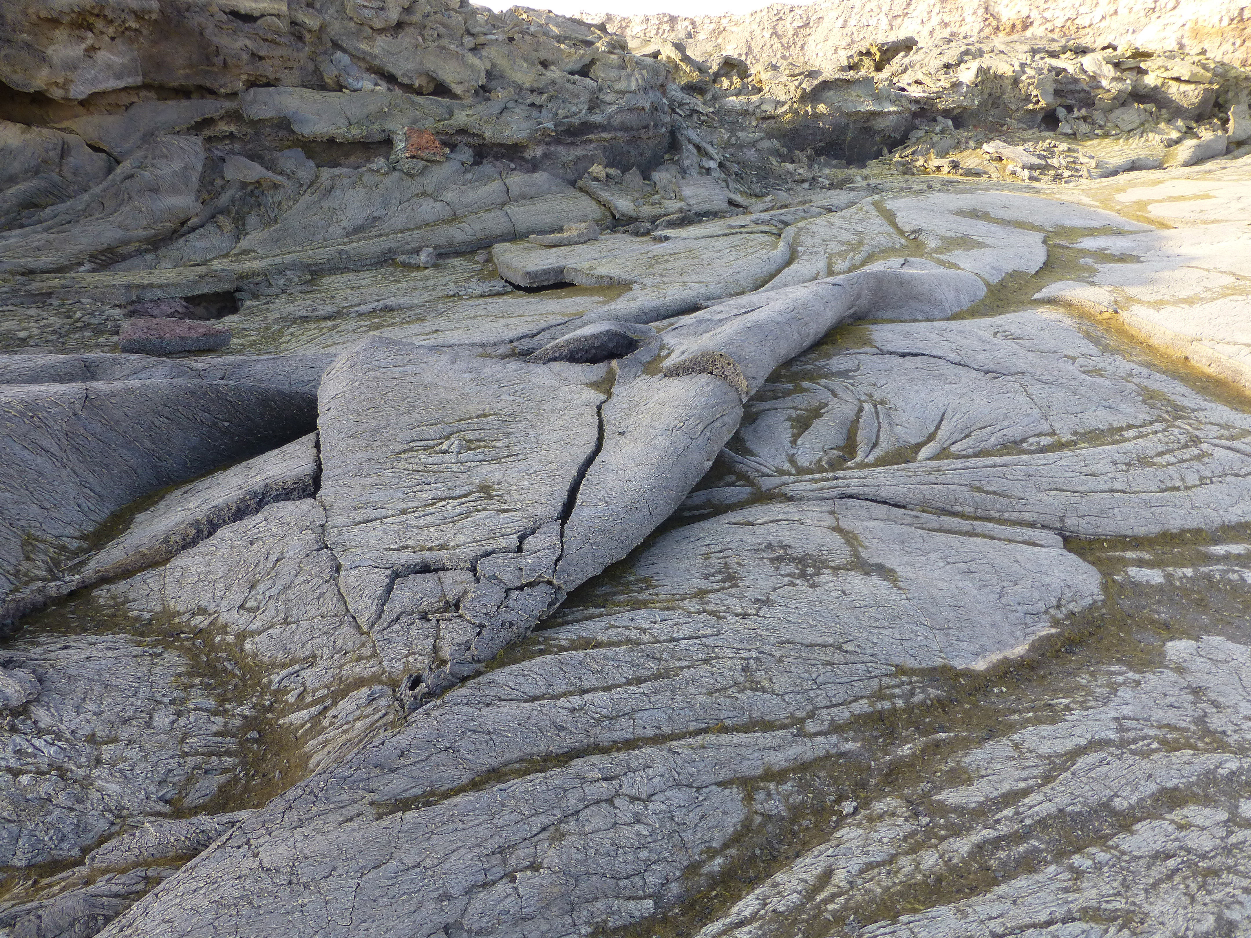 Erta Ale (Ethiopie, Région Afar, Danakil) : formation volcanique